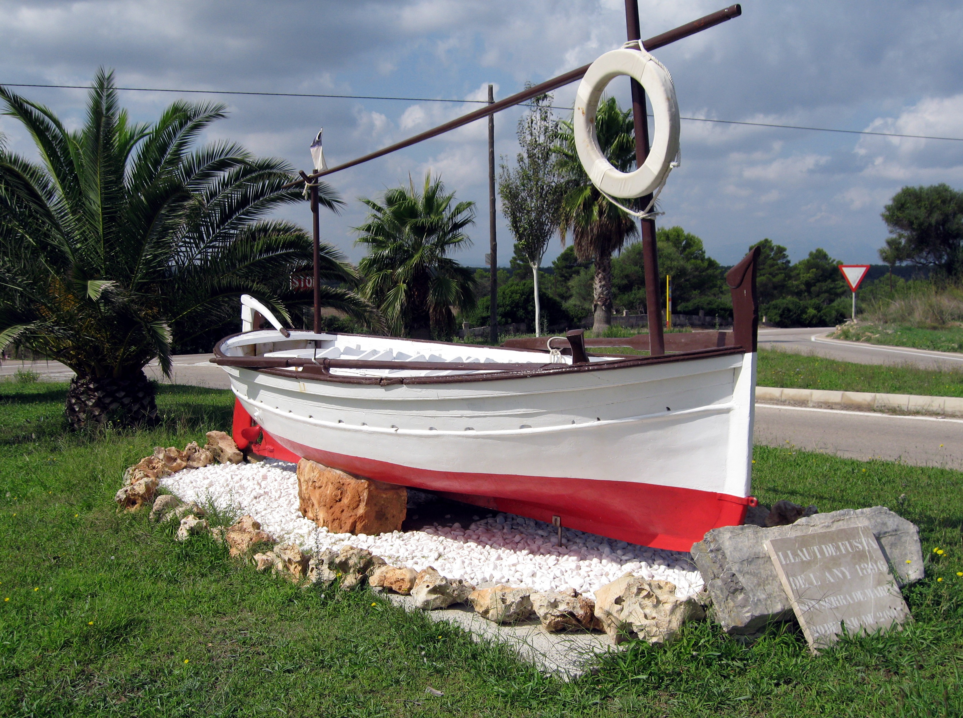 Llaüt an der Straße nach Son Serra de Marina, Gemeinde Santa Margalida, Mallorca, Spanien